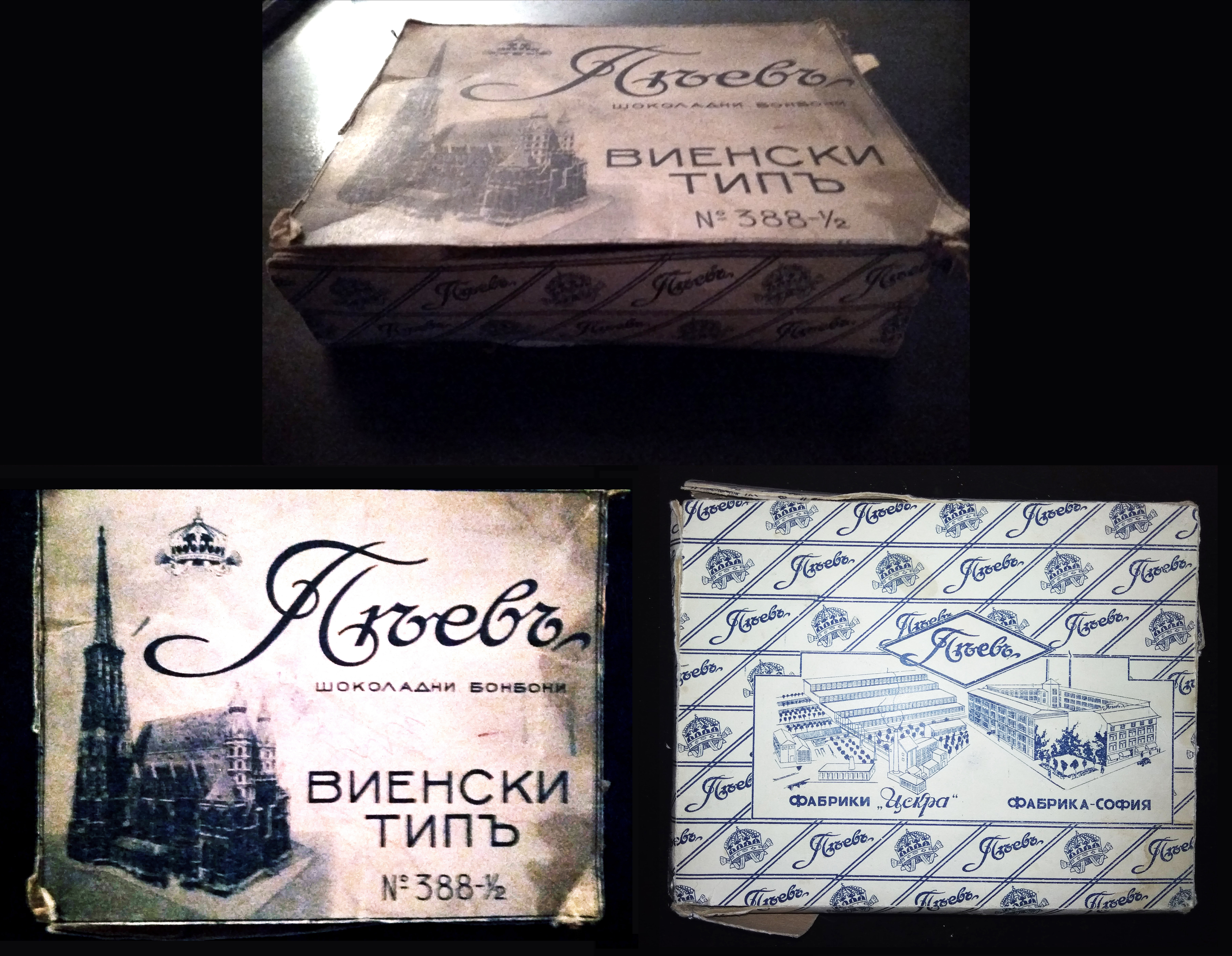 Българският царски шоколадови бонбати Пеев - Виенски тип 1941г.